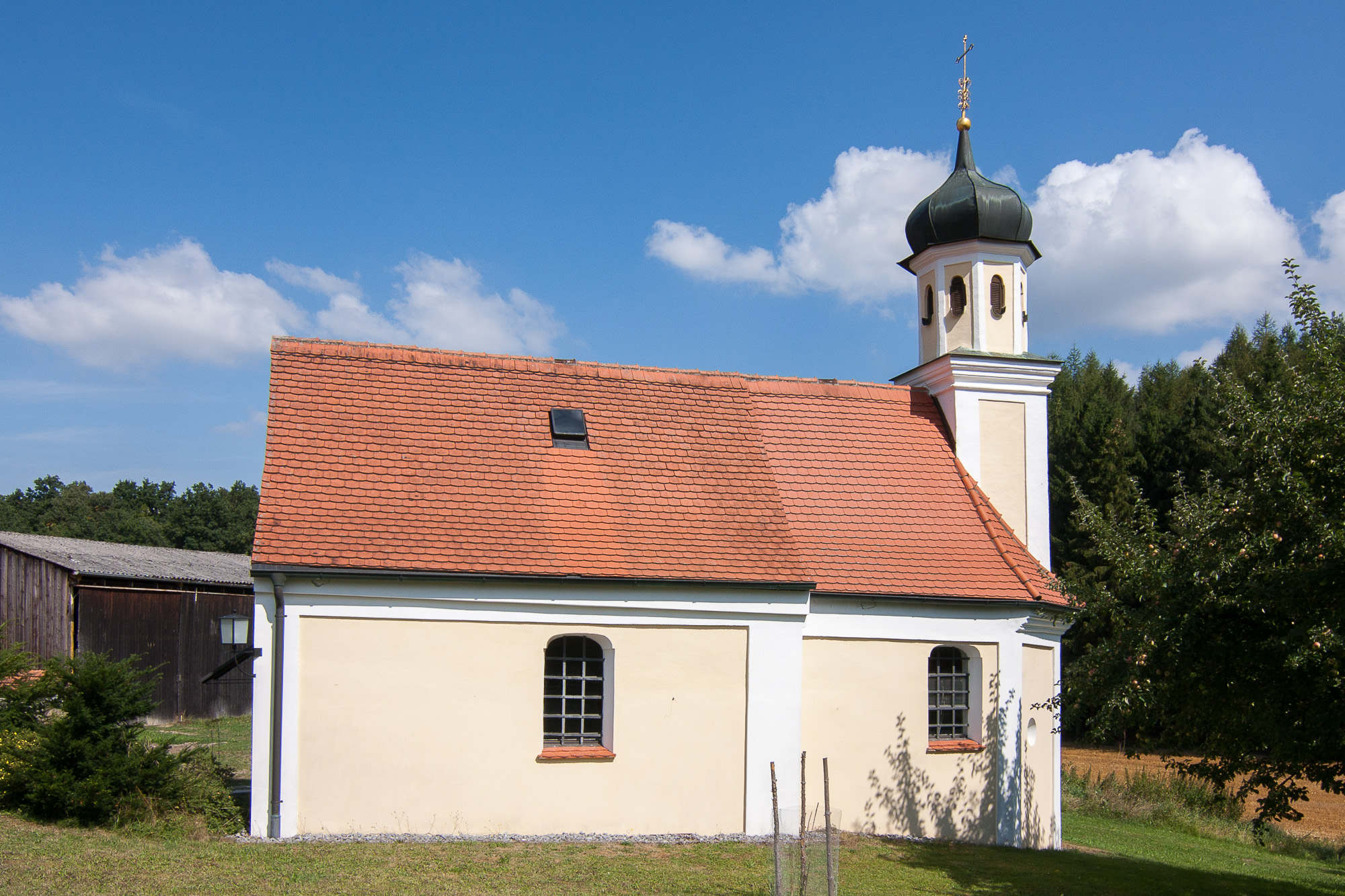 Kath. Filialkirche St. Peter und Paul; 17. Jahrhundert, Umgestaltung 19. Jahrhundert; mit Ausstattung.This is a photograph of an architectural monument.